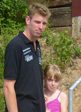 Sven mit Tochter in Gründau 2007